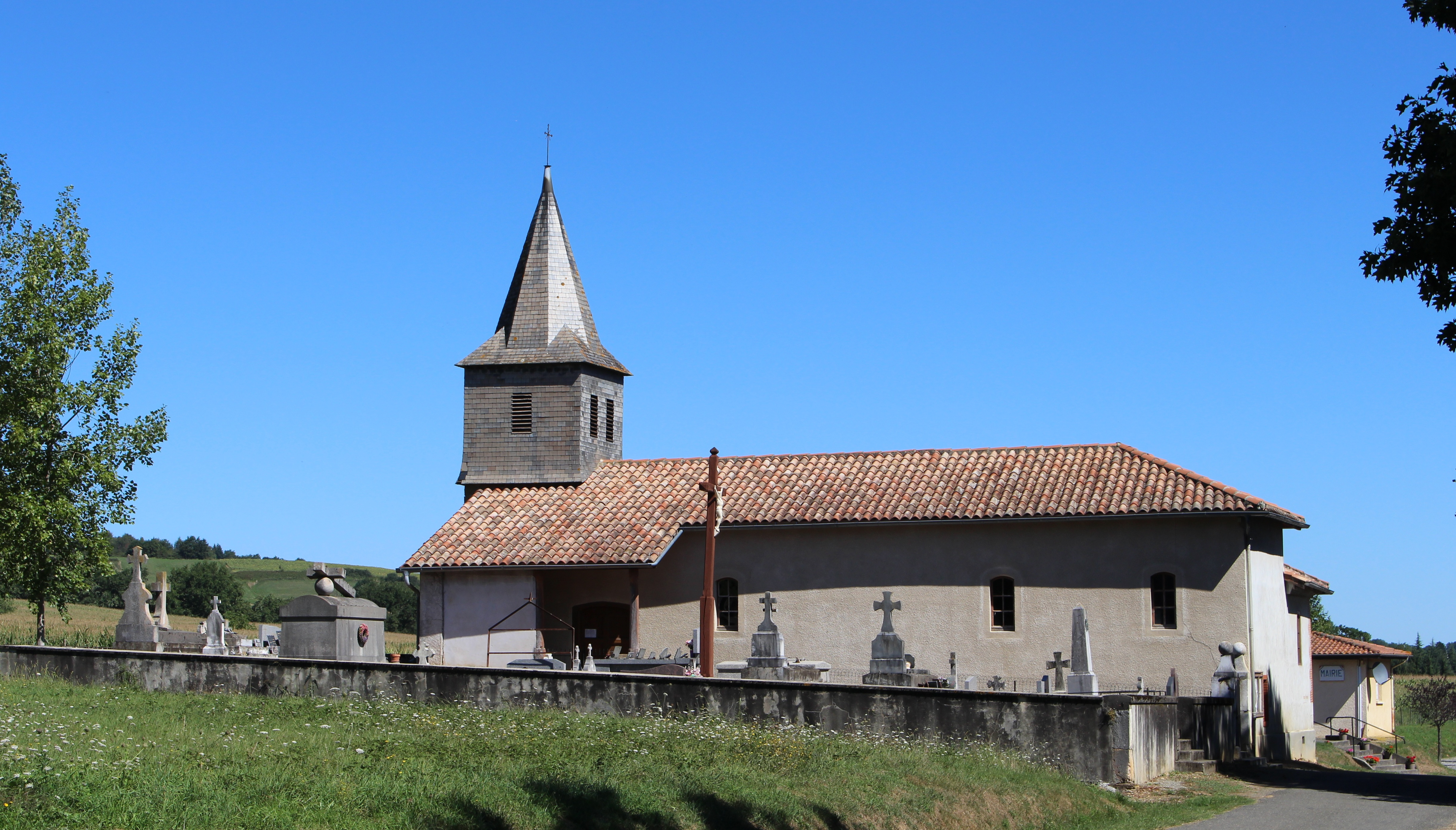 Église Saint-François-d'Assise de Caubous (Hautes-Pyrénées)